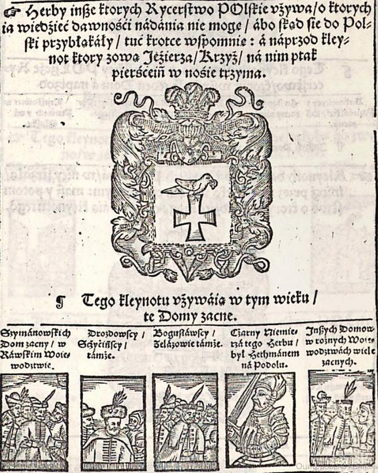 Герб Езержа и Черный Немира в книге B. Paprockiego "Gniazdo cnoty: zkąd herby rycerstwa sławnego Krolestwa Polskiego, Wielkiego Księstwa Litewskiego, Ruskiego, Pruskiego, Mazowieckiego, Zmudzkiego y inszych Państw do tego Krolestwa nalezacych Książąt y Panow poczatek swoy maią". Kraków: 1578, s. 1115